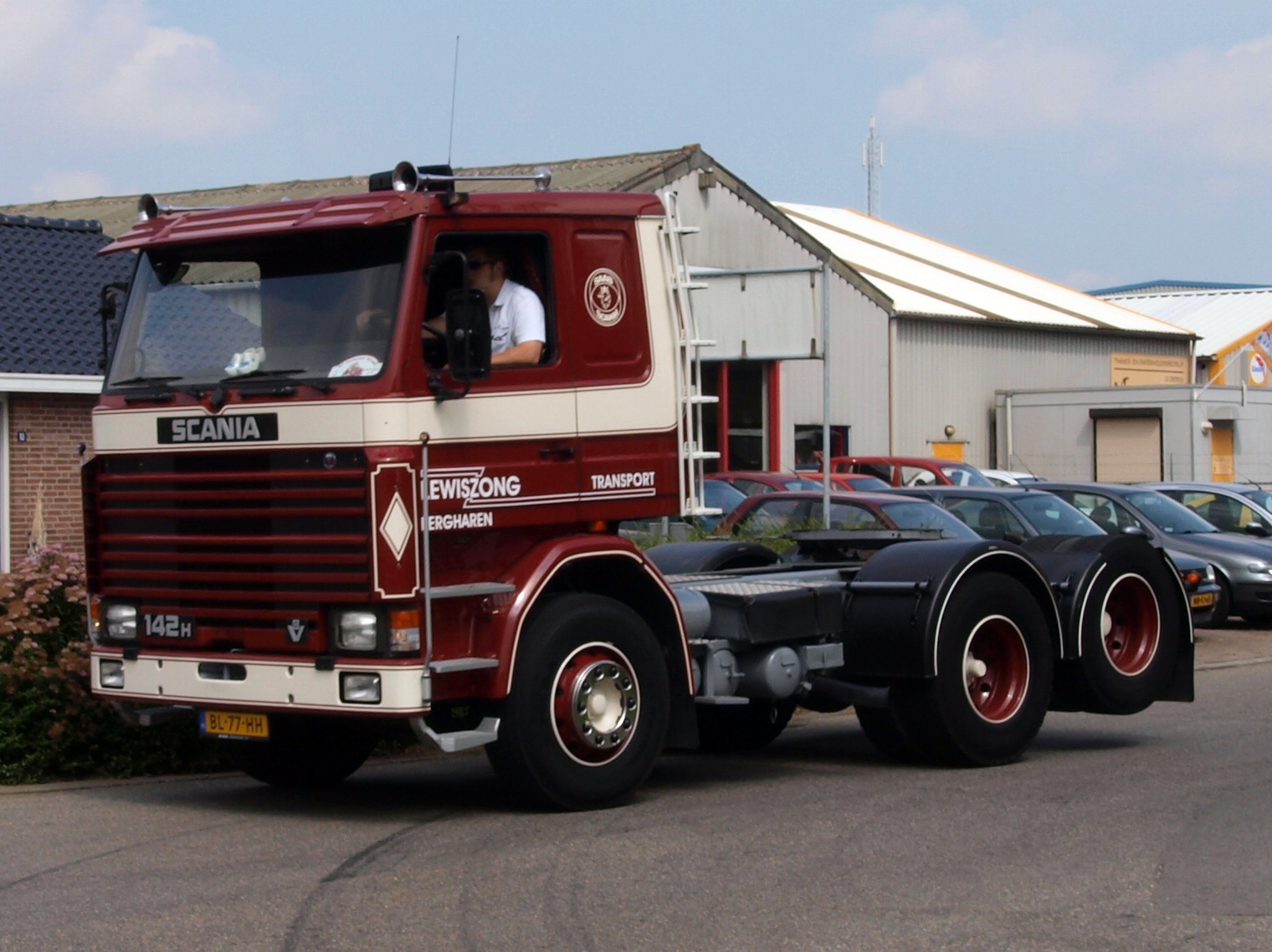 1985 Scania RH6X2Z